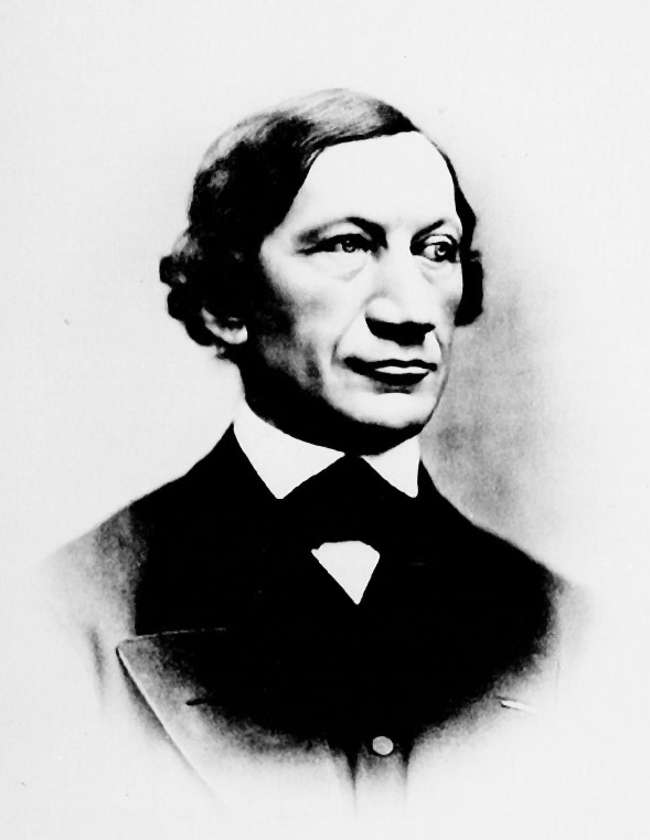 Biographies alsaciennes avec portraits en photographie, série 1